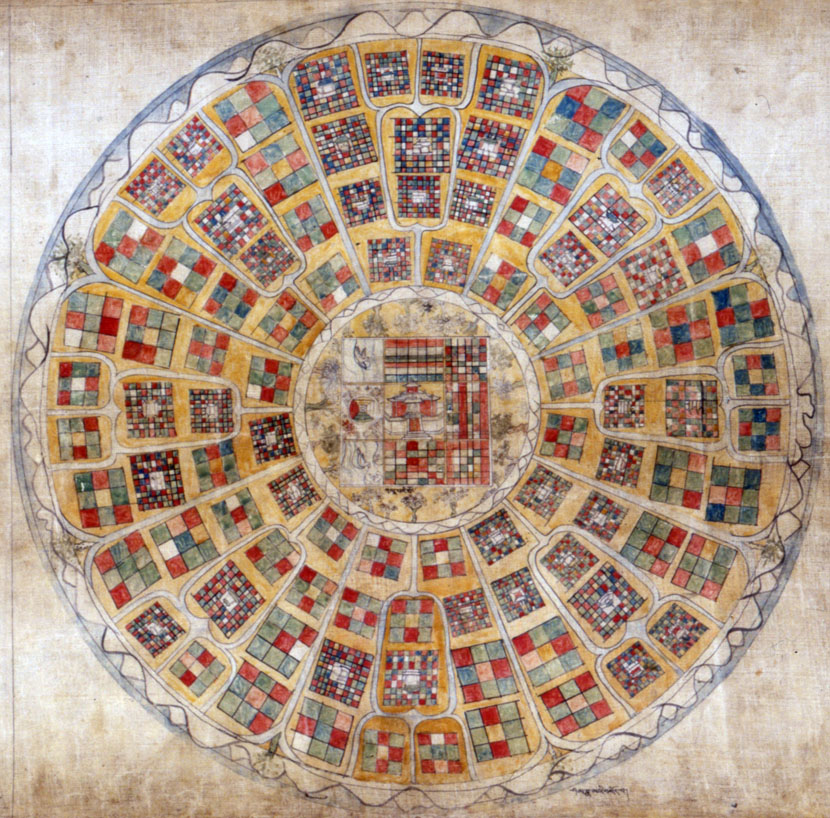 Mappa di Śambhala attribuita al periodo di Mi bskyod rdo rje (Mikyö Dorje) VIII Karmapa (XVI secolo). Da qui: È conservato presso il Rubin Museum of Art, di New York. Cfr. qui